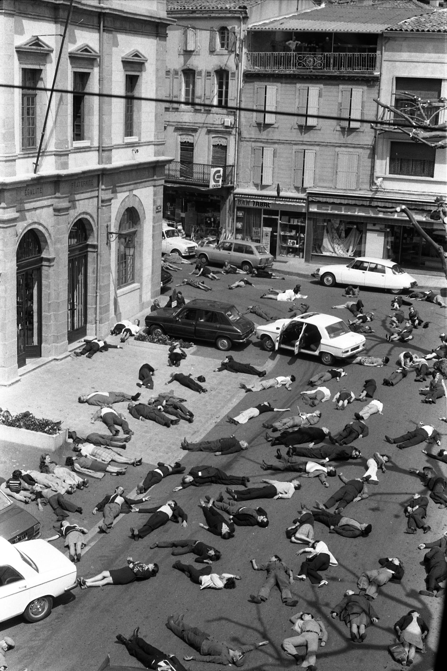 Mazamet (Tarn). 17 mai 1973. Vue d'ensemble en plongée d'un grand nombre de personnes couchées au milieu de la rue et sur les trottoirs (comme si elles étaient mortes), voitures arrêtées portières ouvertes ; plan d'ensemble façades immeubles. Cliché pris lors de l'opération médiatique "Mazamet ville morte" organisée par la Sécurité routière. Observation: Opération "Mazamet ville morte" ou "La ville rayée de la carte" : opération médiatique organisée par la Sécurité routière. Durant 15 minutes les habitants de mazamet ont du se coucher sur la chaussée pour symboliser les 16610 personnes tuées sur les routes de France en 1972 (Mazamet comptait alors environ 16000 habitants). Un film intitulé "Mazamet ville morte" fut consacré à l'évènement avec l'appui de l'ORTF, diffusé sur "24 heures à la Une", émission de Michel Tauriac.